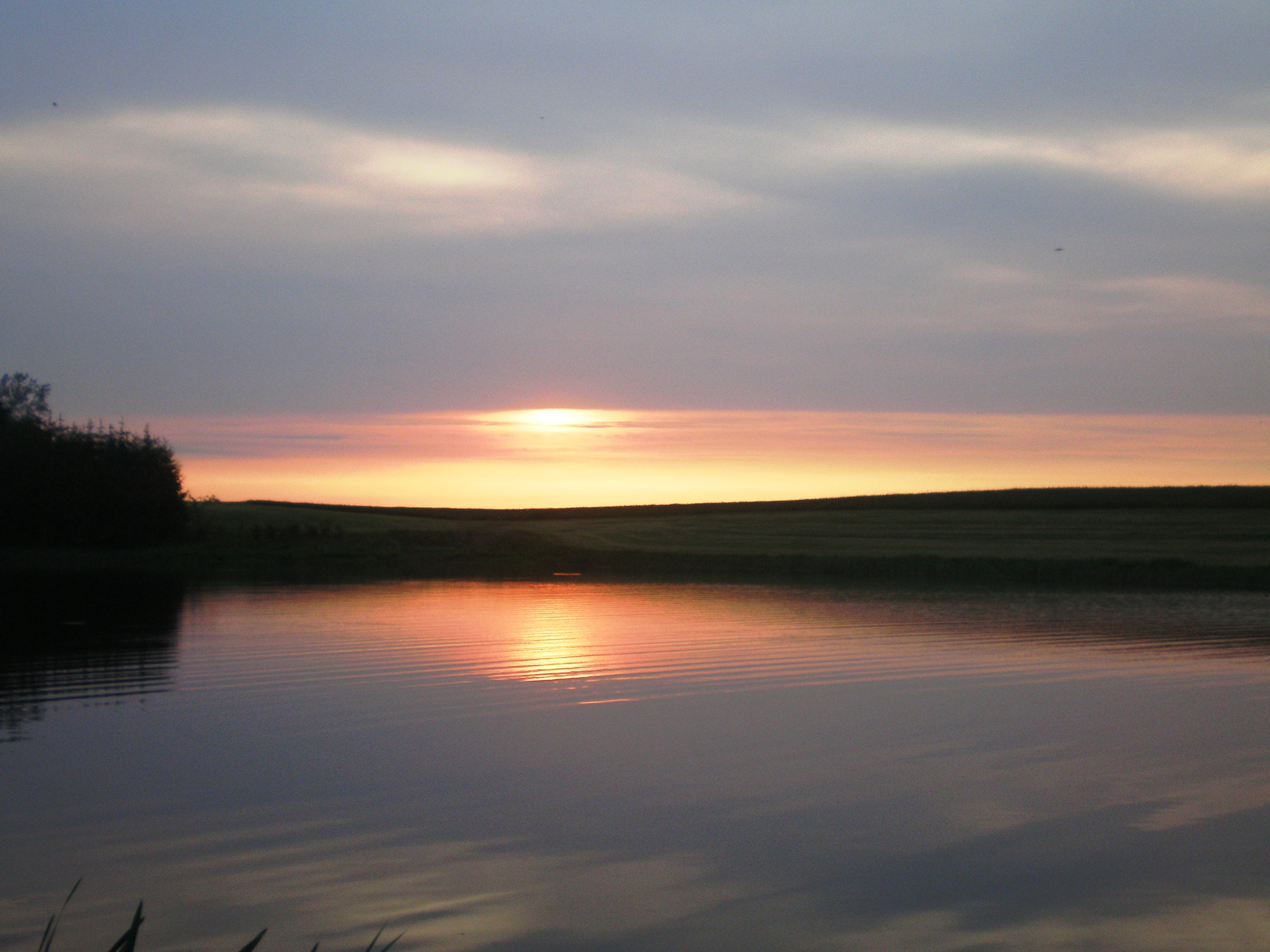 Labūnavos tvenkinys vakare